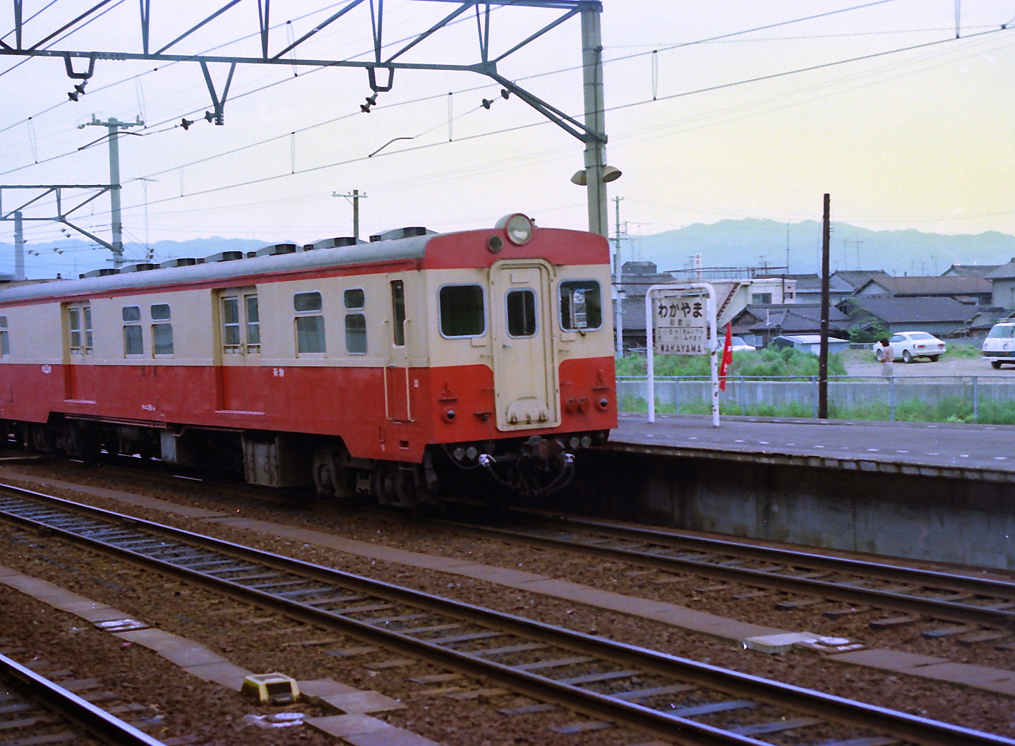 和歌山駅 和歌山線ホーム キユニ19